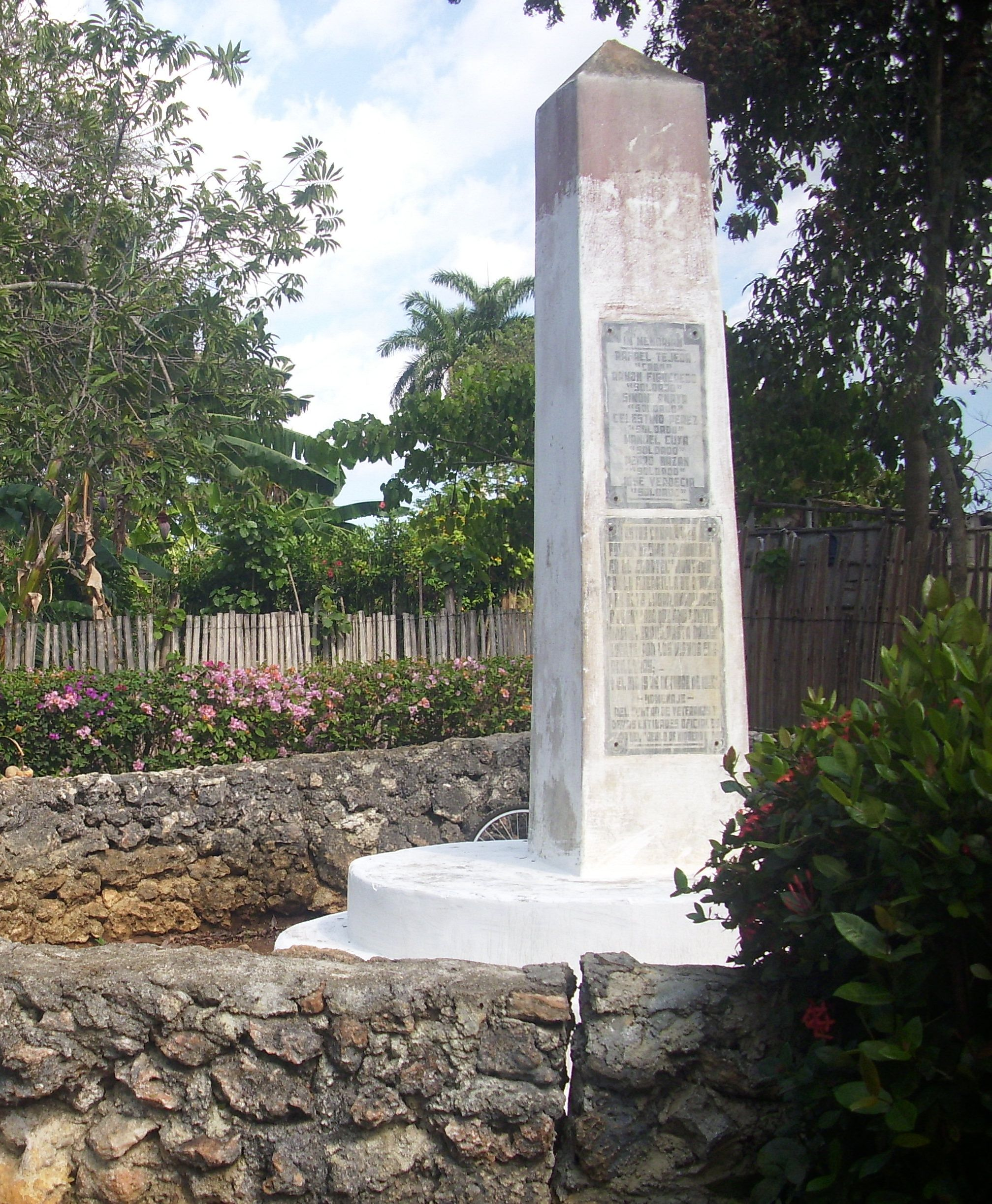 Obelisco, Niquero